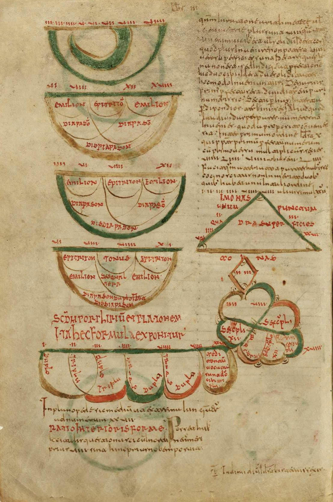 Folio 26v miniado del Isidori Etymologiae Codex Toletanus (nunc Matritensis) BNE Vitr. 14-3. Escritura minúscula visigótica (escuela toledanosevillana) 163 folios a dos columnas en pergamino, de 50.52 líneas por página. Procedente de la Catedral de Toledo.